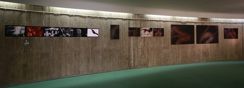 vue de l'exposition "Horsesvisions" à l'Espace Niemeyer, Paris